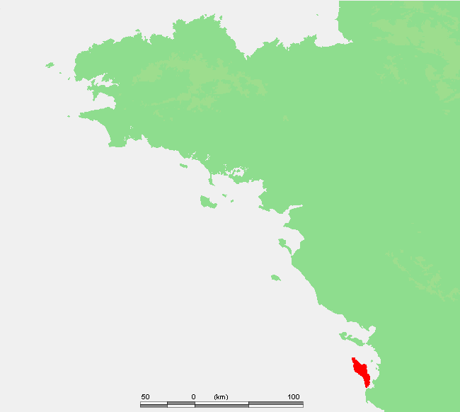 Position de l'Île d'Oléron, en France.